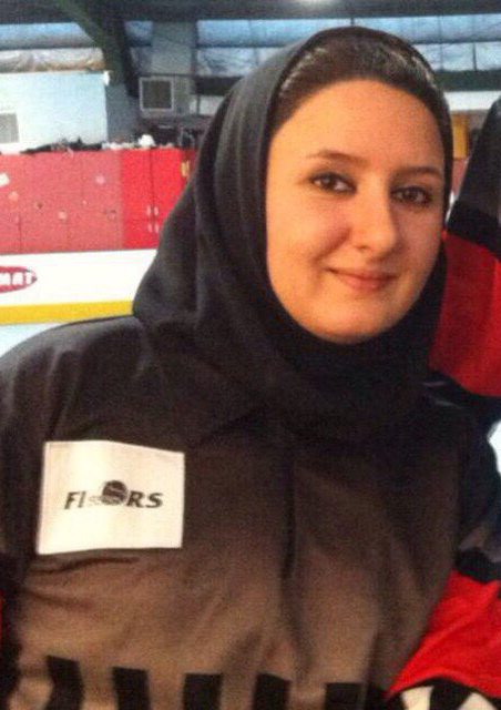 من این عکس را خود گرفته ام، اما برای اطلاع رسانی در خصوص فوت ایشان، در اختیار یک پیج اینستاگرام نیز قرار داده ام